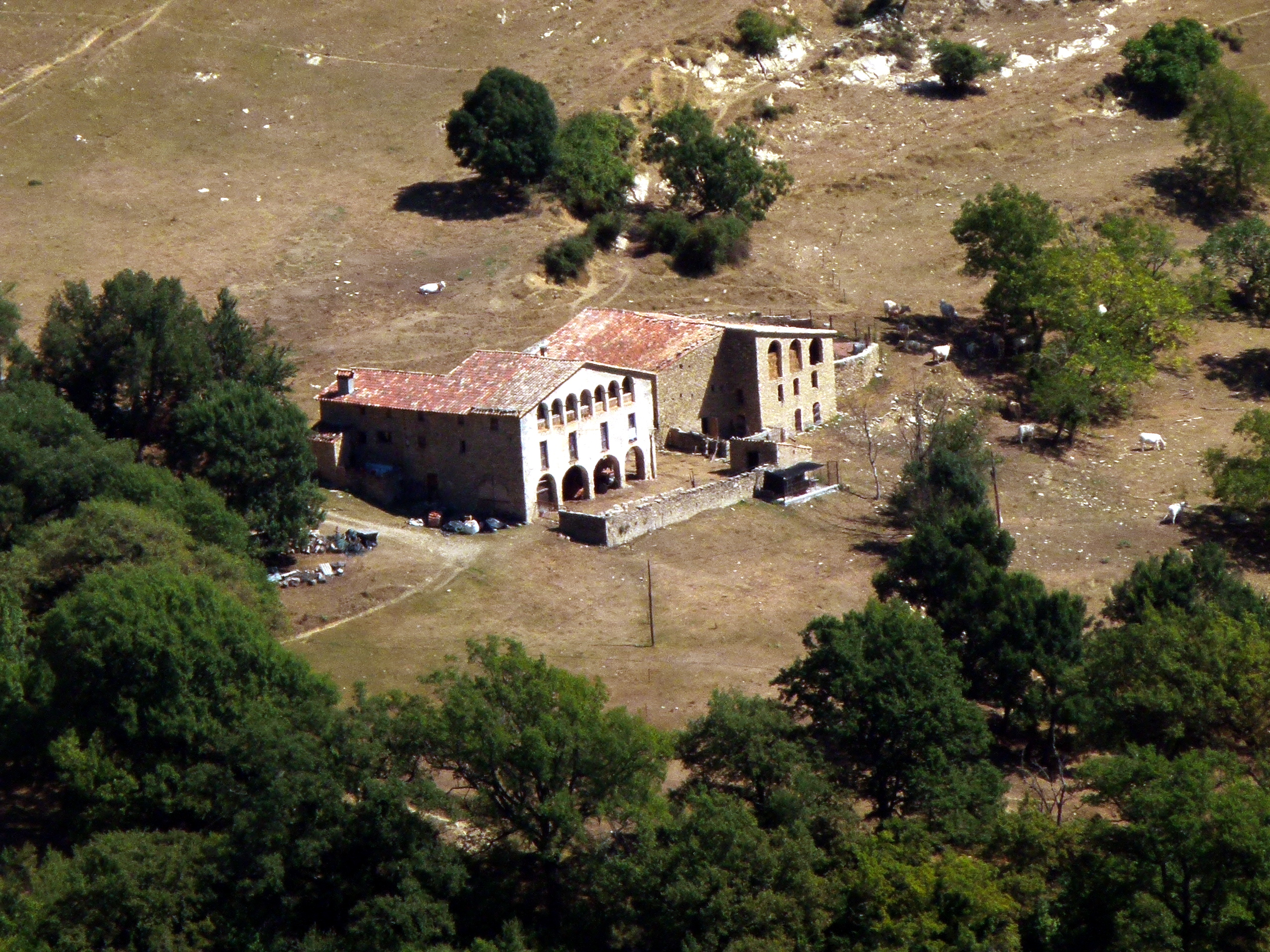 Masia El Beç de Salarça